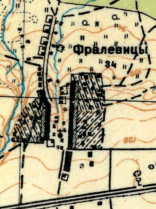 Топографическая карта Ленинградской области, квадрат О-35-11-В-г (Петровицы), деревня Флоревицы.